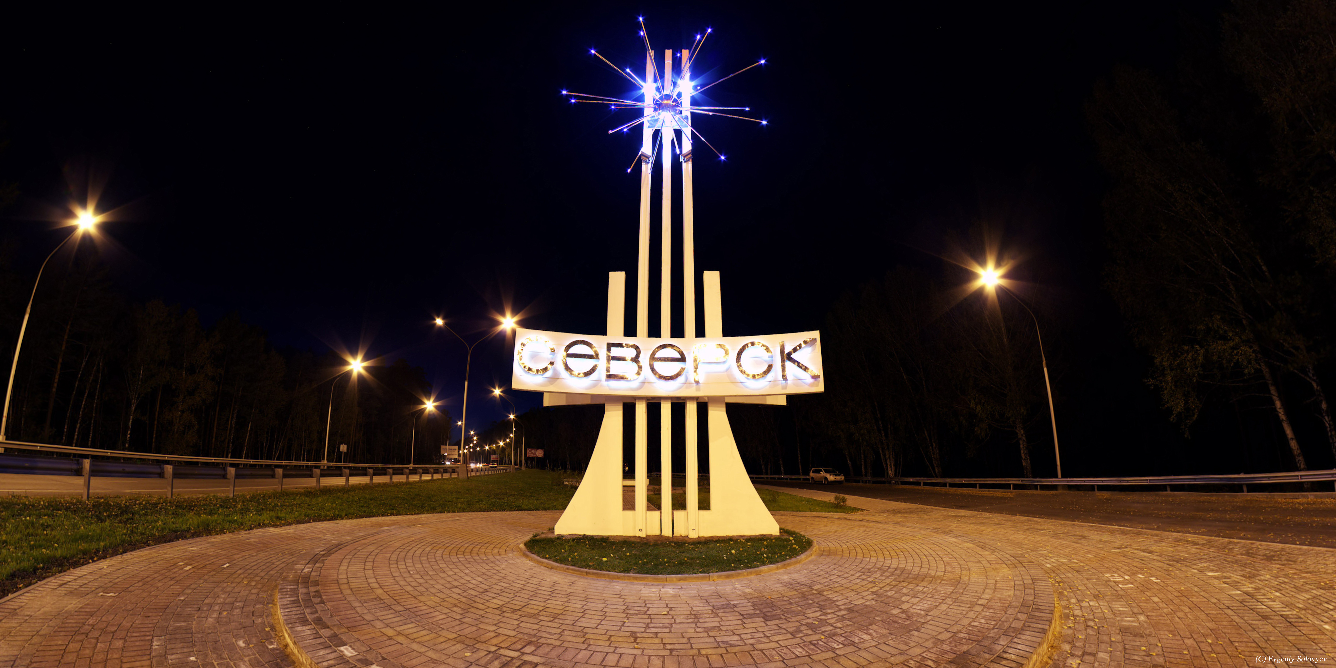 Стела расположенная на въезде в город Северск представляет собой устремлённые вверх железобетонные дуги, которые завершает блестящий шар с расходящимися в разные стороны лучами. Это модель атомного ядра – символа энергии, подчиняющейся силе, воле и разуму человека. Этот монумент посвящён людям, создававшим гигант атомной промышленности - Сибирский химический комбинат.